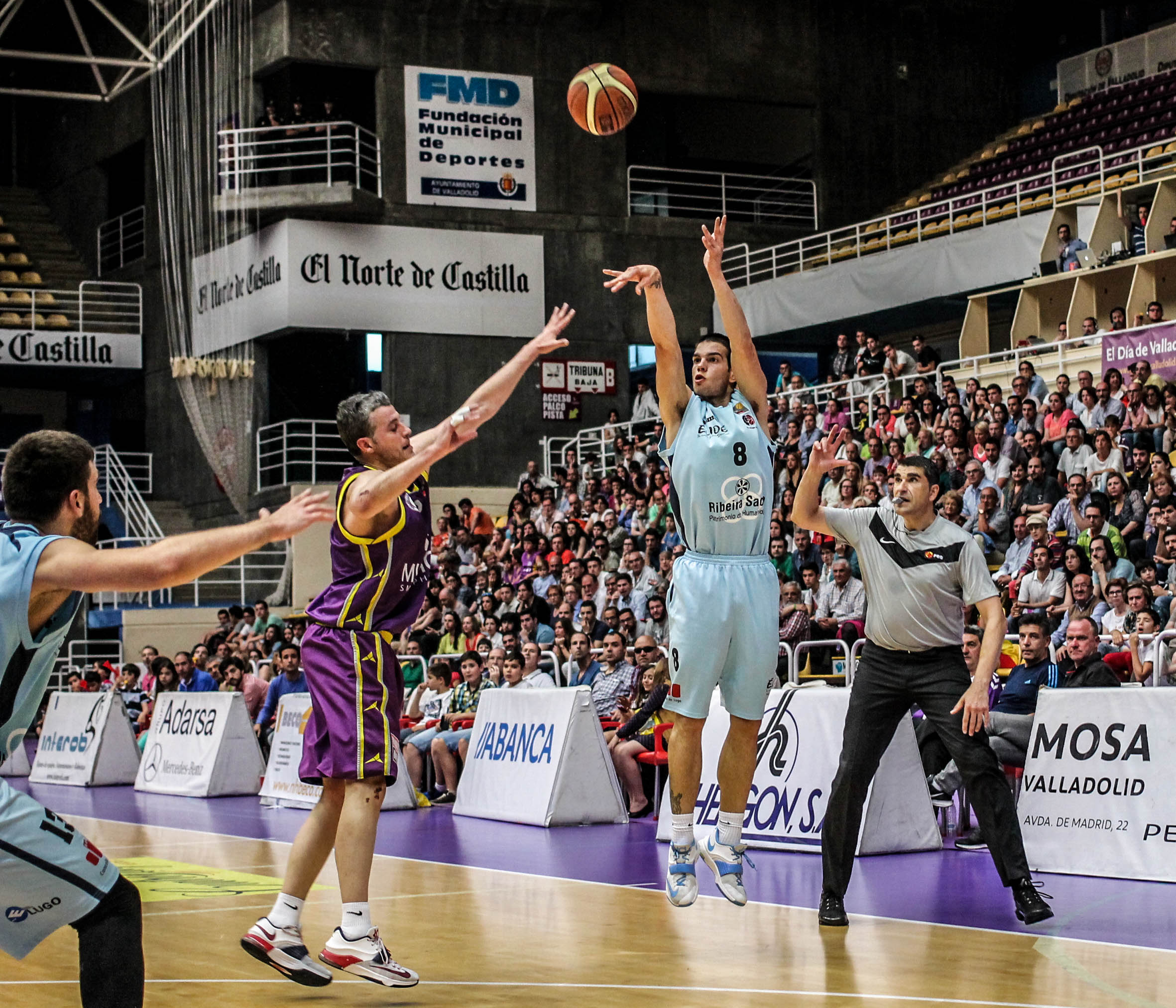 Partido entre C.B.Valladolid y C.B.Breogán en el polideportivo Pisuerga en Valladolid.